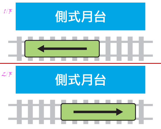 側式疊式月台示意圖